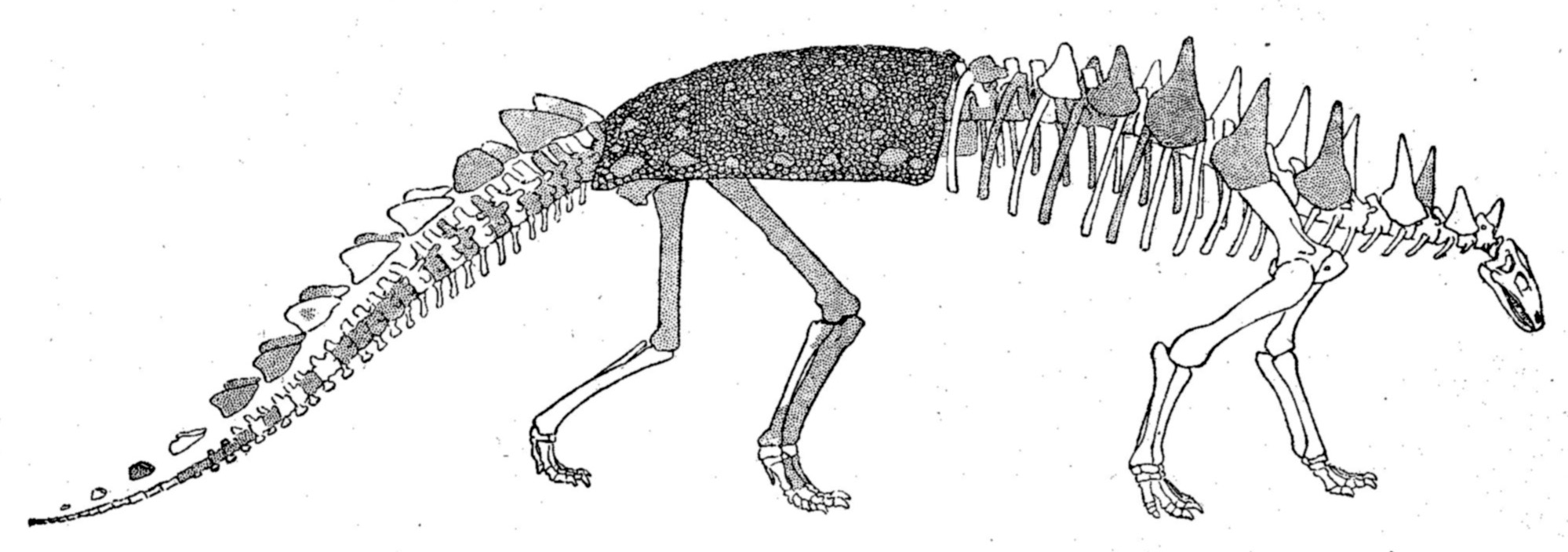 Polacanthus foxii skeleton